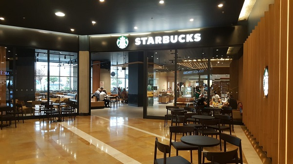 Starbucks'ın Şanlıurfa'daki bir mağazası